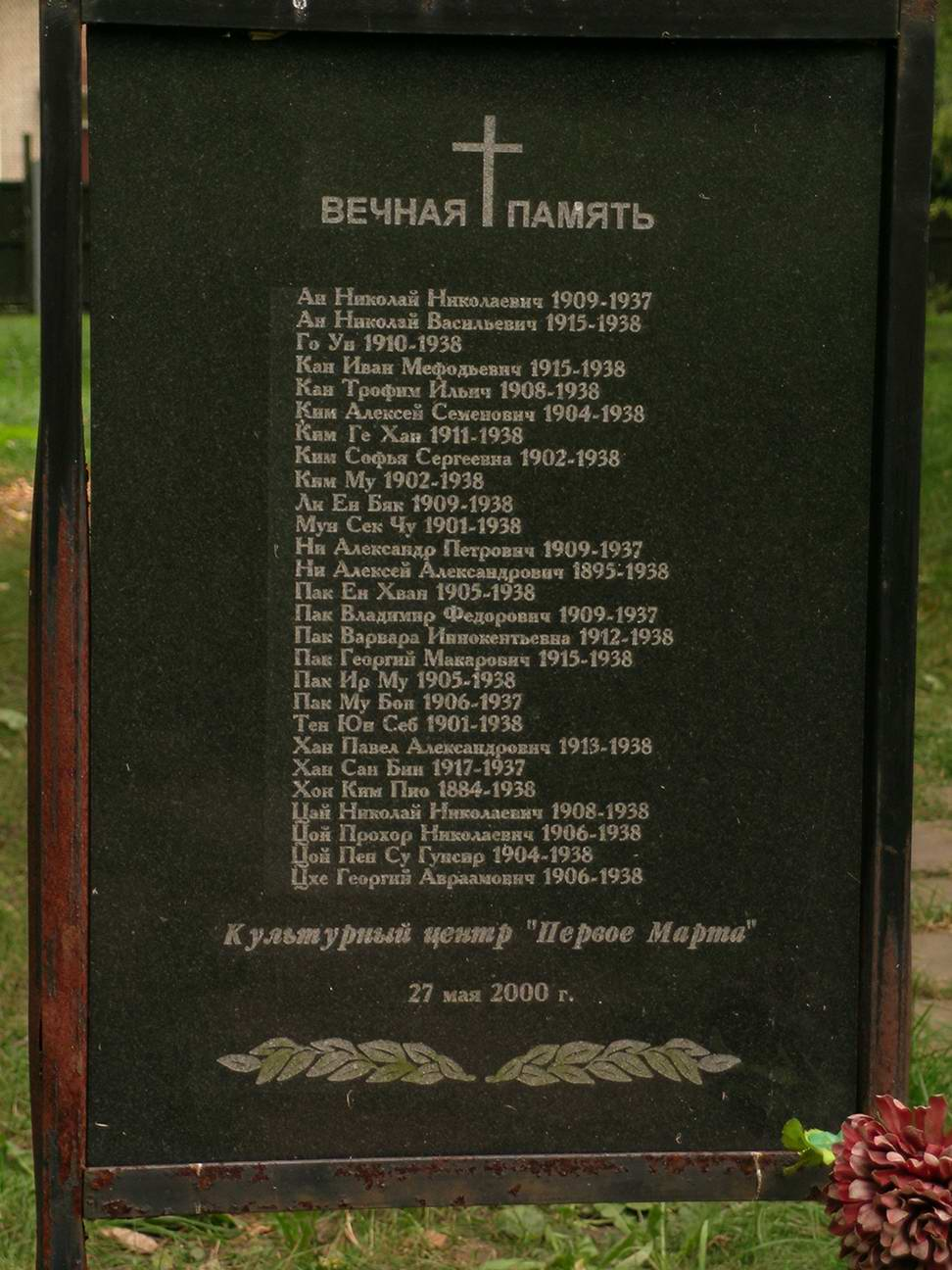 Бутовский полигон. Вечная память. Культурный центр «Первое марта», 27 мая 2000 г.